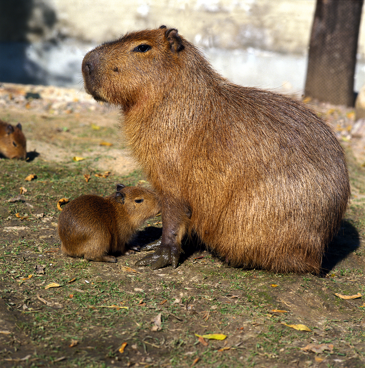 Капиабара